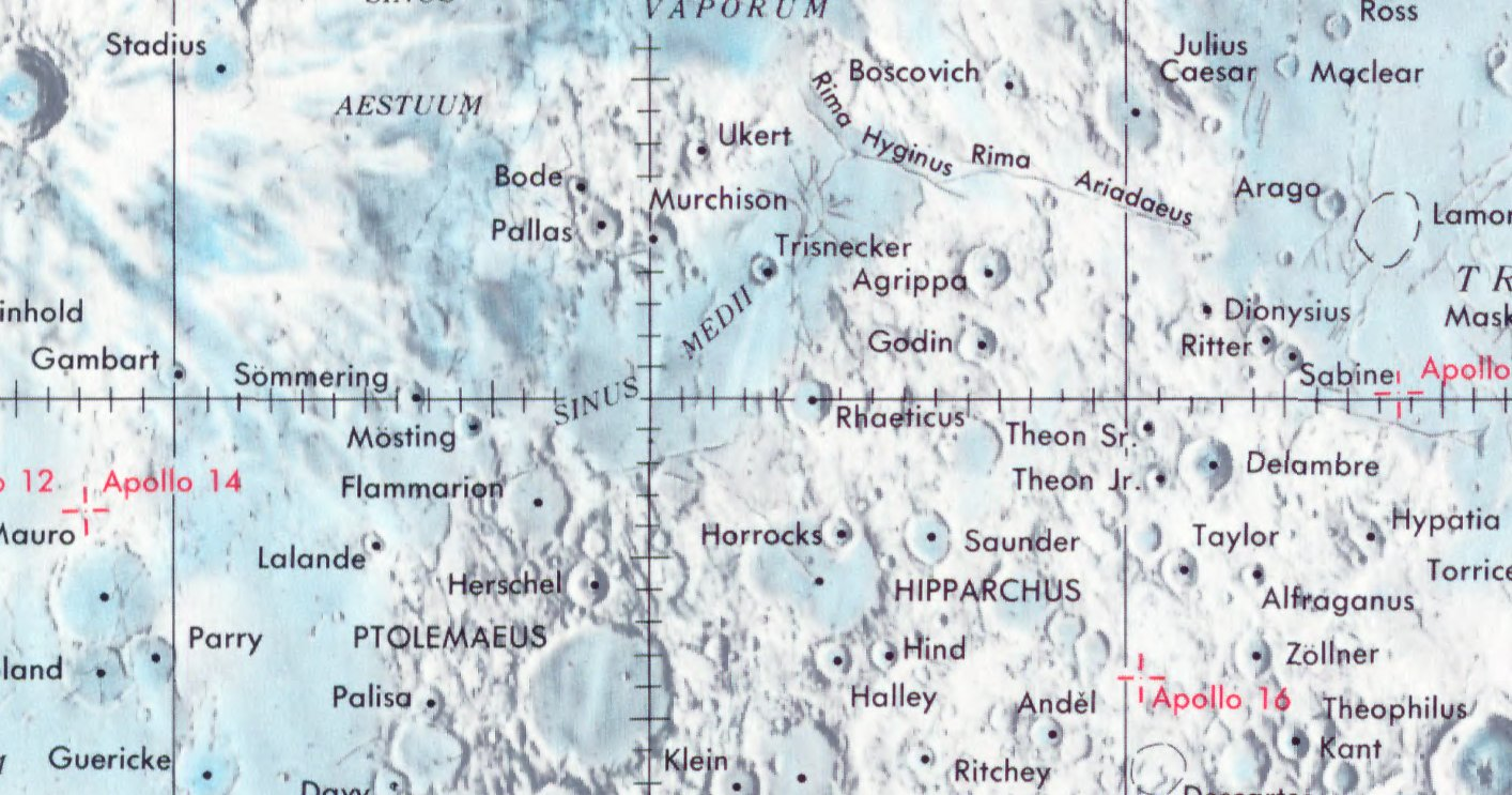 Detalle de la imagen Moonmap from Moon Map - Equatorial region 45S to 45N - LPC1 - NASA del Sinus Medii